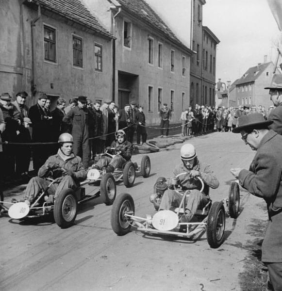 Zentralbild Schmidt 4.4.1962 Kleinstrennwagen nun auch in Halle Ein erstes Stelldichein gaben sich 10 der neuen Kleinstrennwagen "Formel K" vor einigen Tagen in Halle. Sie drehten im Norden der Stadt zunächst einige Trainingsrunden. Der Startschuß zum ersten offiziellen Rennen im Bezirk Halle wird am 8. Mai bei "Rund um das Klubhaus der Werktätigen" gegeben. Wie bereits in zahlreichen Städten der DDR steht auch in Halle der Motorsportclub den Interessenten beim Bau der Formel-K-Wagen mit Rat und Tat zur Seite. UBz: Auf der Saalwerder Straße in Halle-Trotha heulen die Motoren. Auch beim Training gab es spannende Kämpfe.